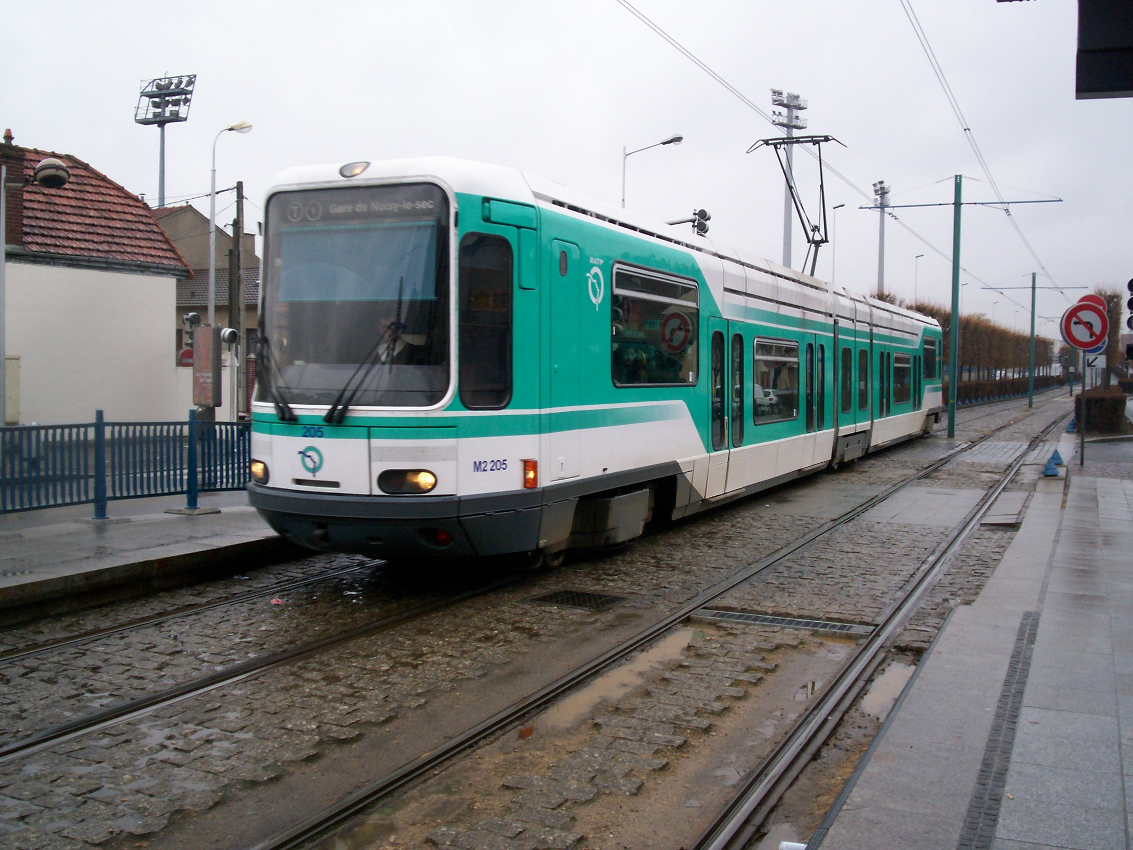 T1 à Stade Géo André